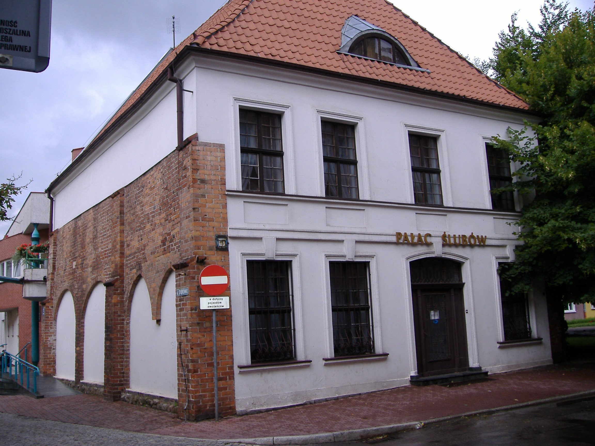 Standesamt Picture taken in Koszalin, Poland